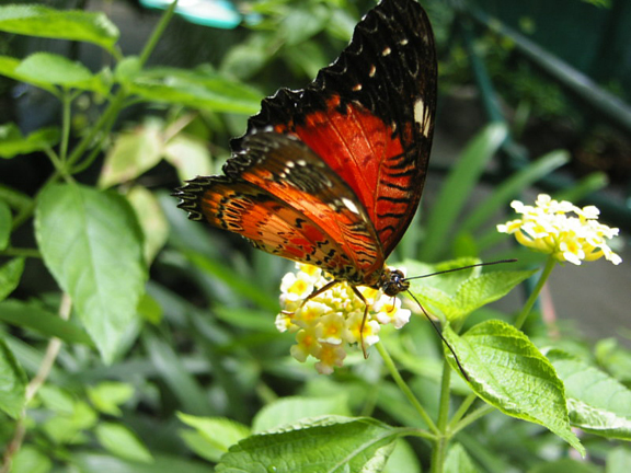 Tagalog: Pulang Paruparo